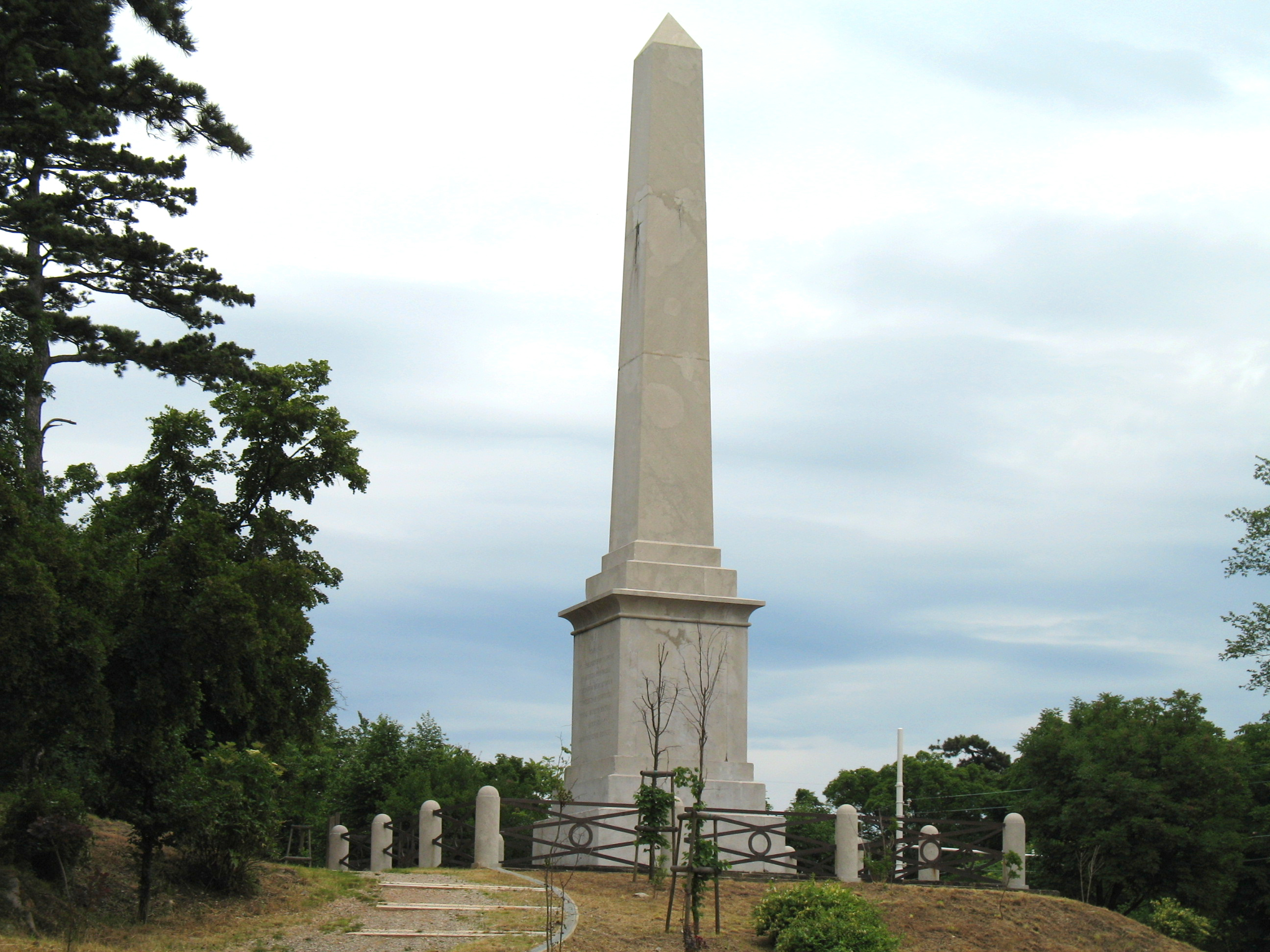 Immagine da Trieste. Obelisco - fermata trenovia di Opicina